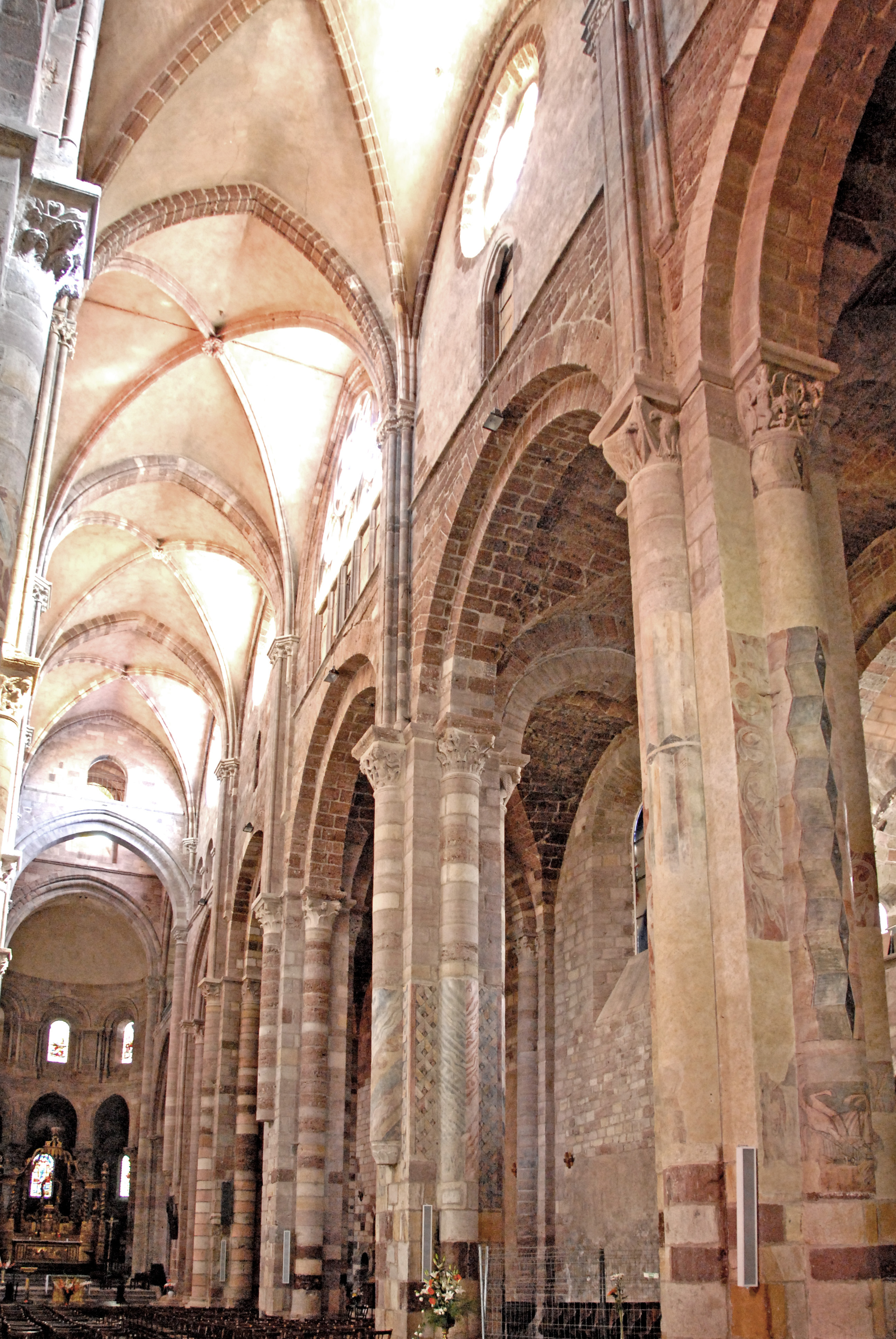 Sain-Julien Brioude, Mittelschiff, SO-Wand